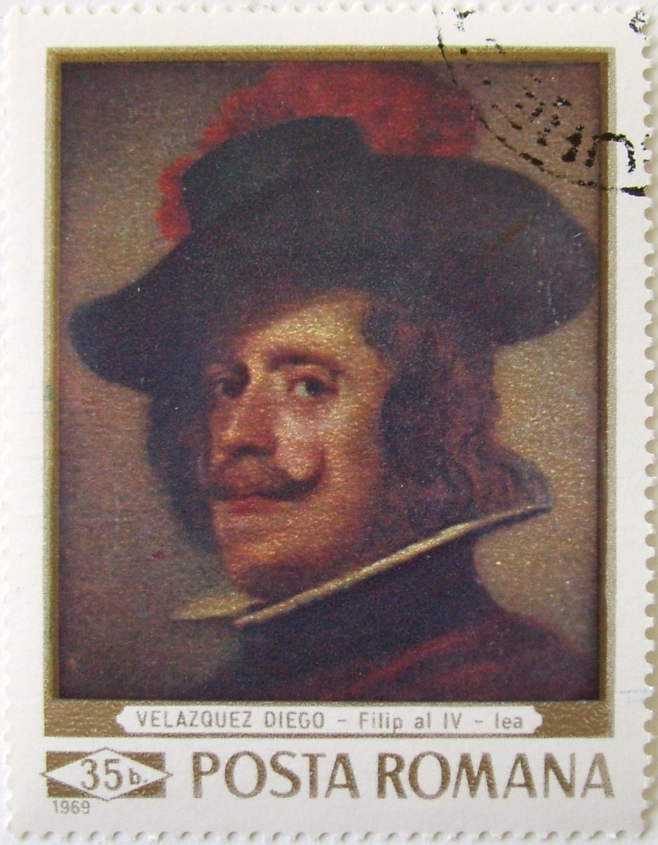 Source: Post of Romania